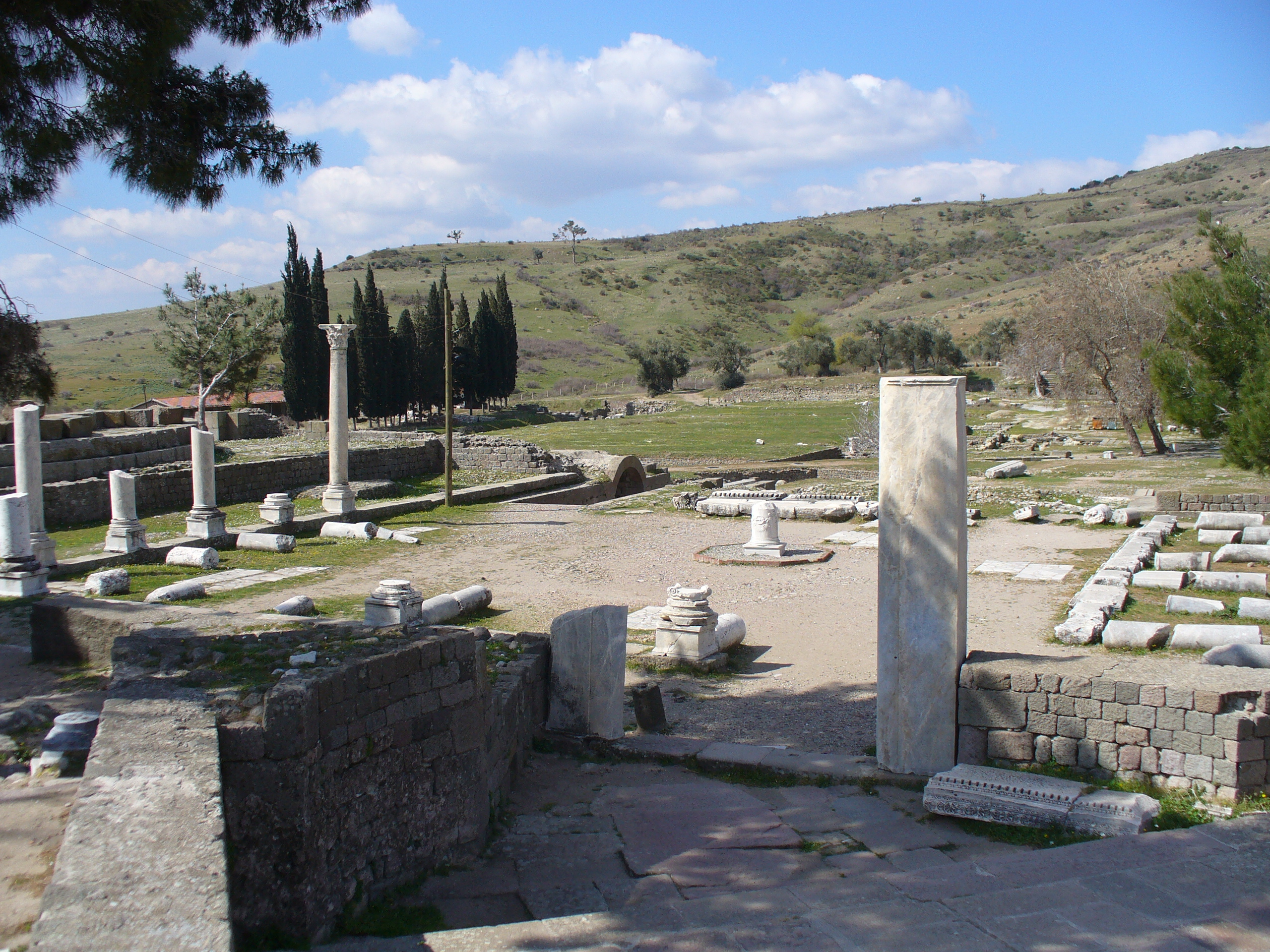 Vista del Asclepeion de Pérgamo (Turquía), desde los Propileos.Asklepion propylon Pergamum 475